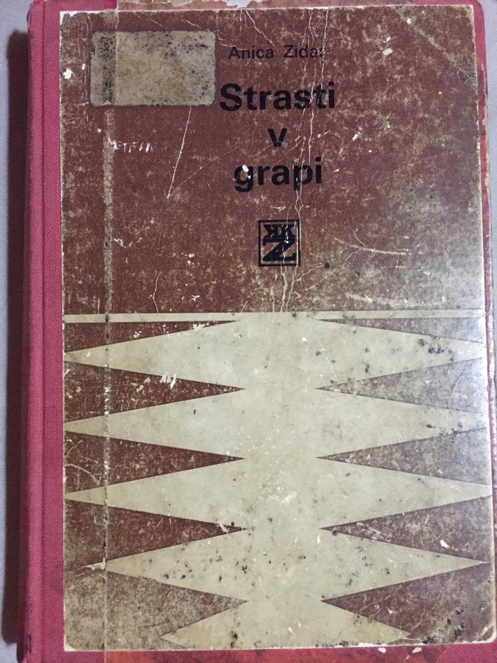 Naslovna stran